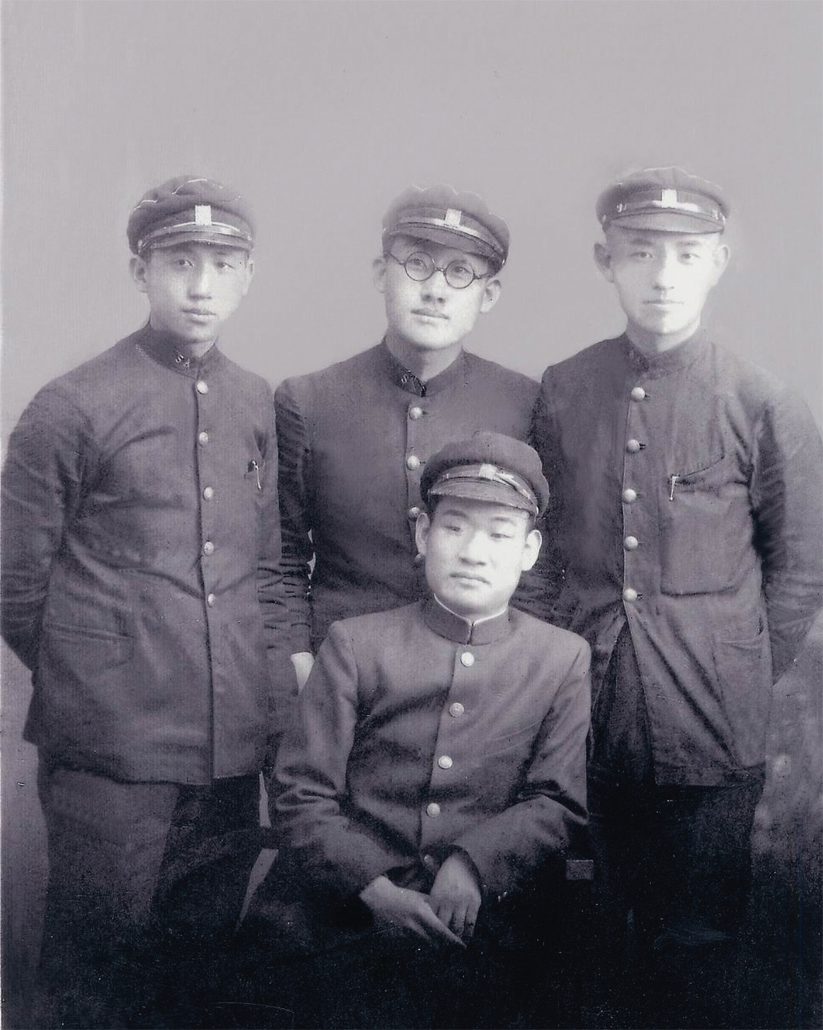 숭실중학교 시절의 윤동주(뒷줄 오른쪽). 가운데 안경 쓴 이가 동창생 문익환 목사.